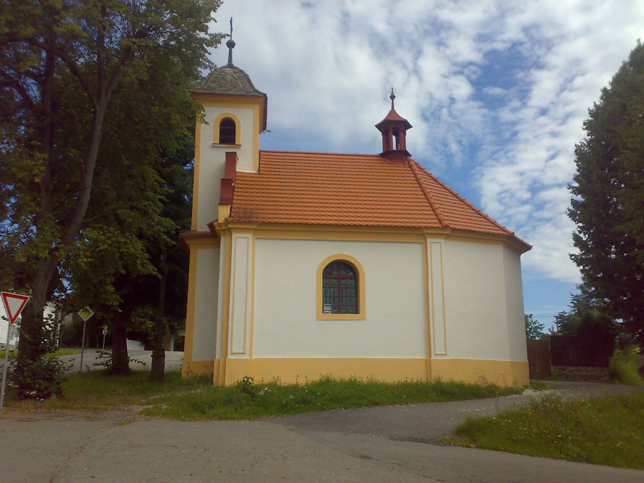 Čepřovice, kaple na návsi